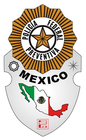 Escudo de la Policía Federal Preventiva, institución que existió en México de 1999 a 2009.